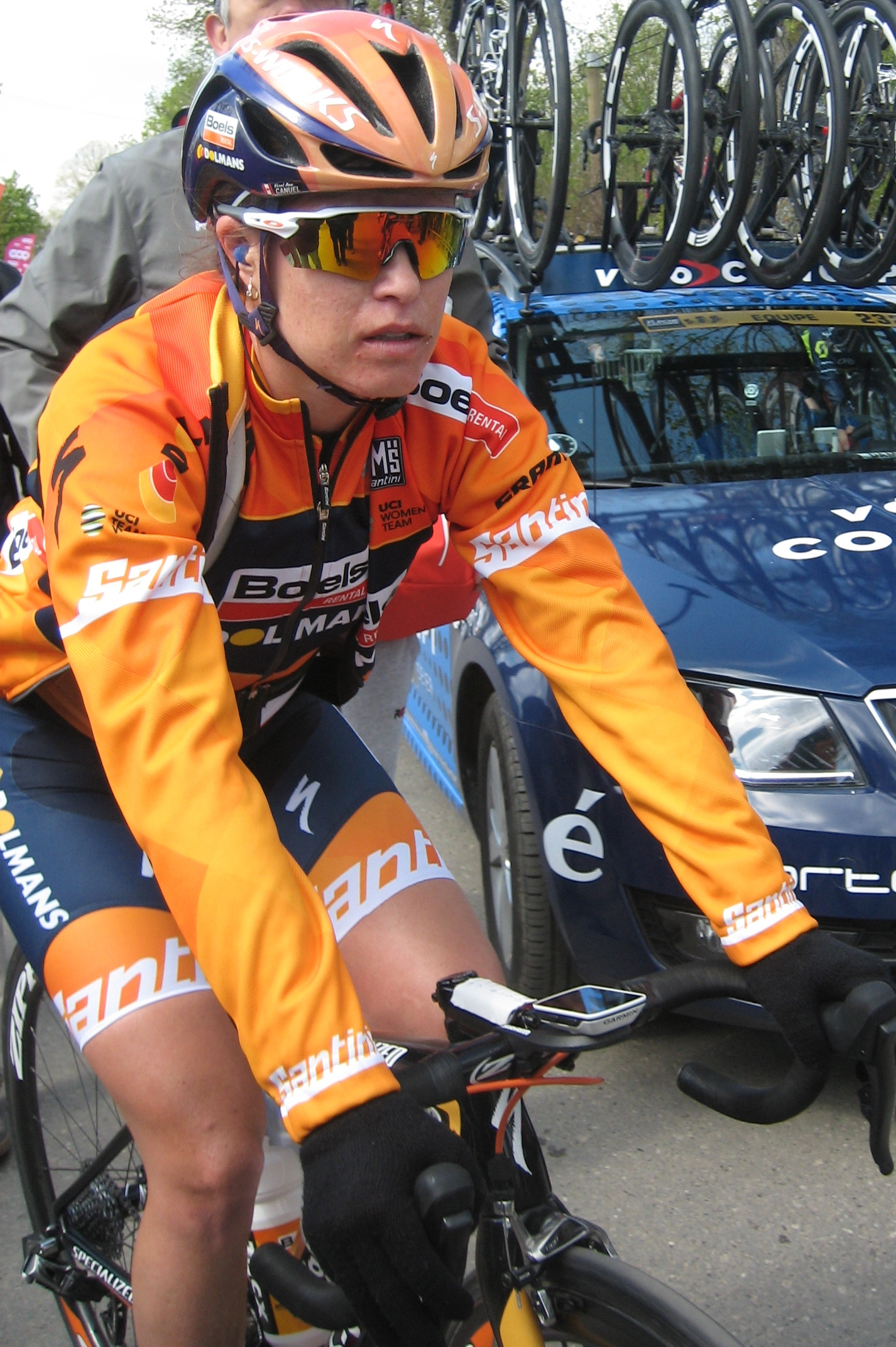 Finish van de Waalse Pijl 2017 in Huy.